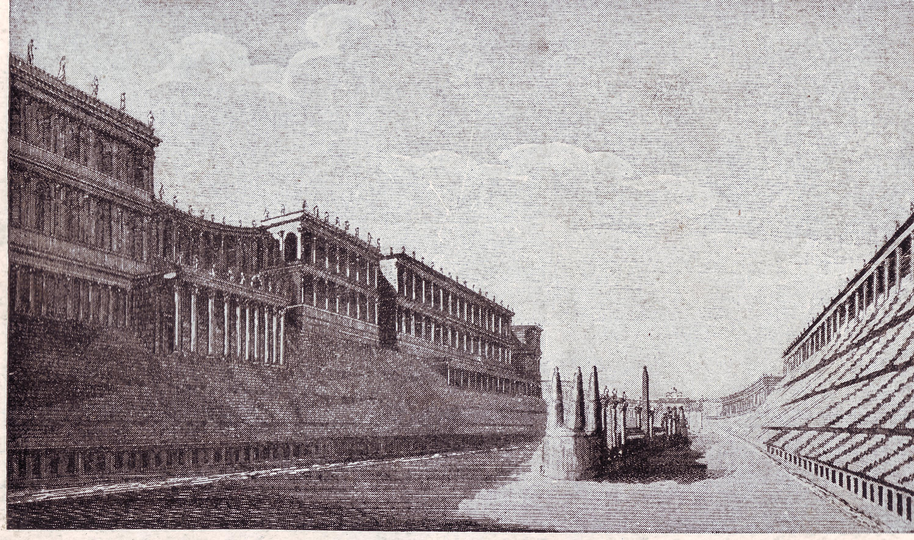 Большой Цирк (реконструкция)